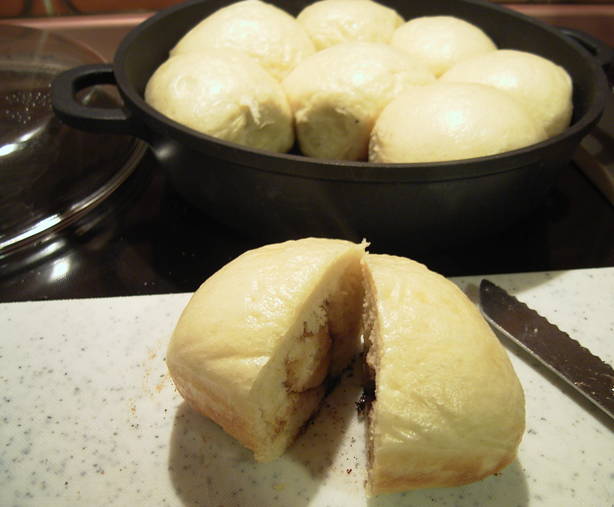 Dampfnudeln